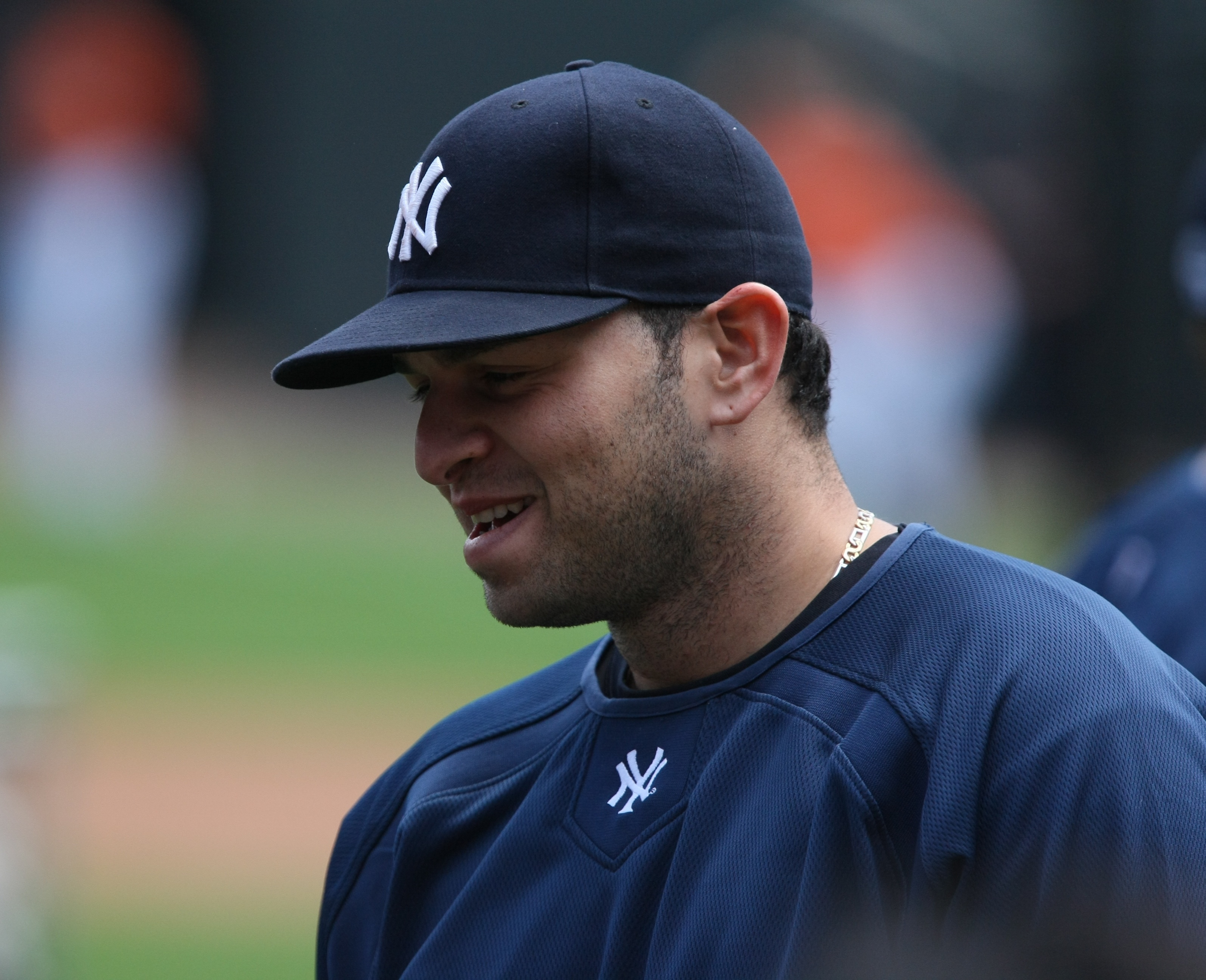 Jonathan Albaladejo